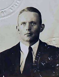 George Fish en 1920.